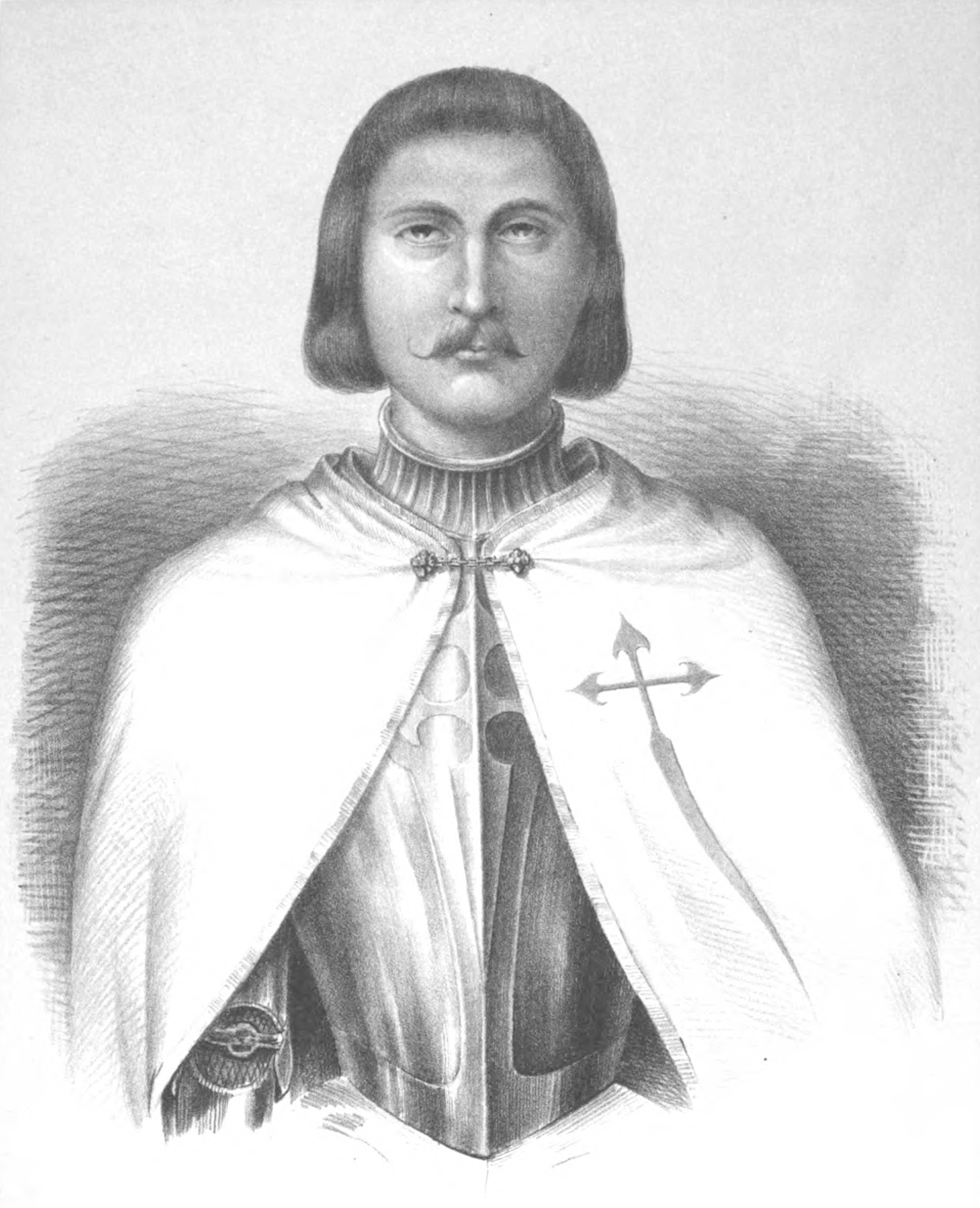 Beltrán de la Cueva.